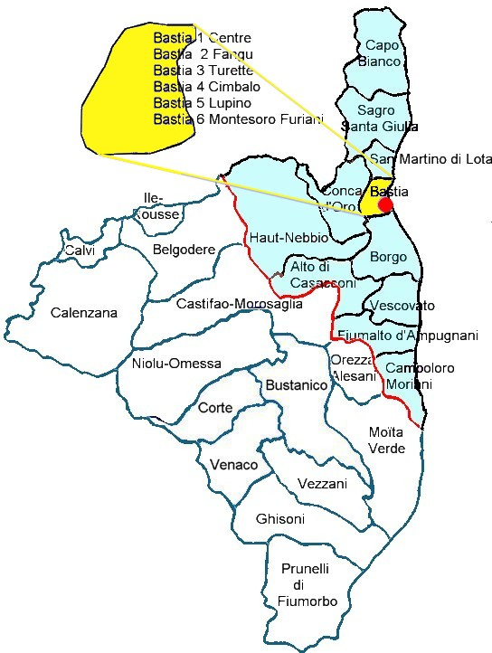 Localisation des six cantons de Bastia et Furiani, Ortu, Haute-Corse